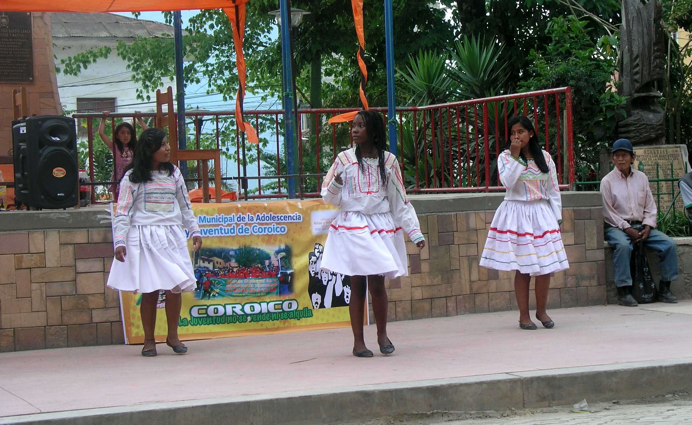 Fête de la jeunesse à Coroico, Bolivie.